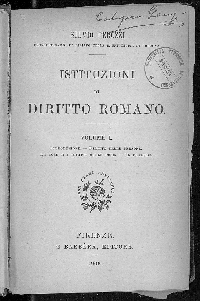 Frontespizio